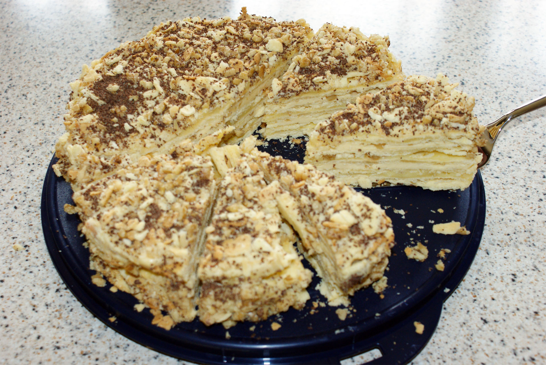 Stécker vum russesche Schichtkuch "Napoleon", mat hausgemate Flueden an zwou verschiddene Crèmen (Mousseline a Kondensmëllech).